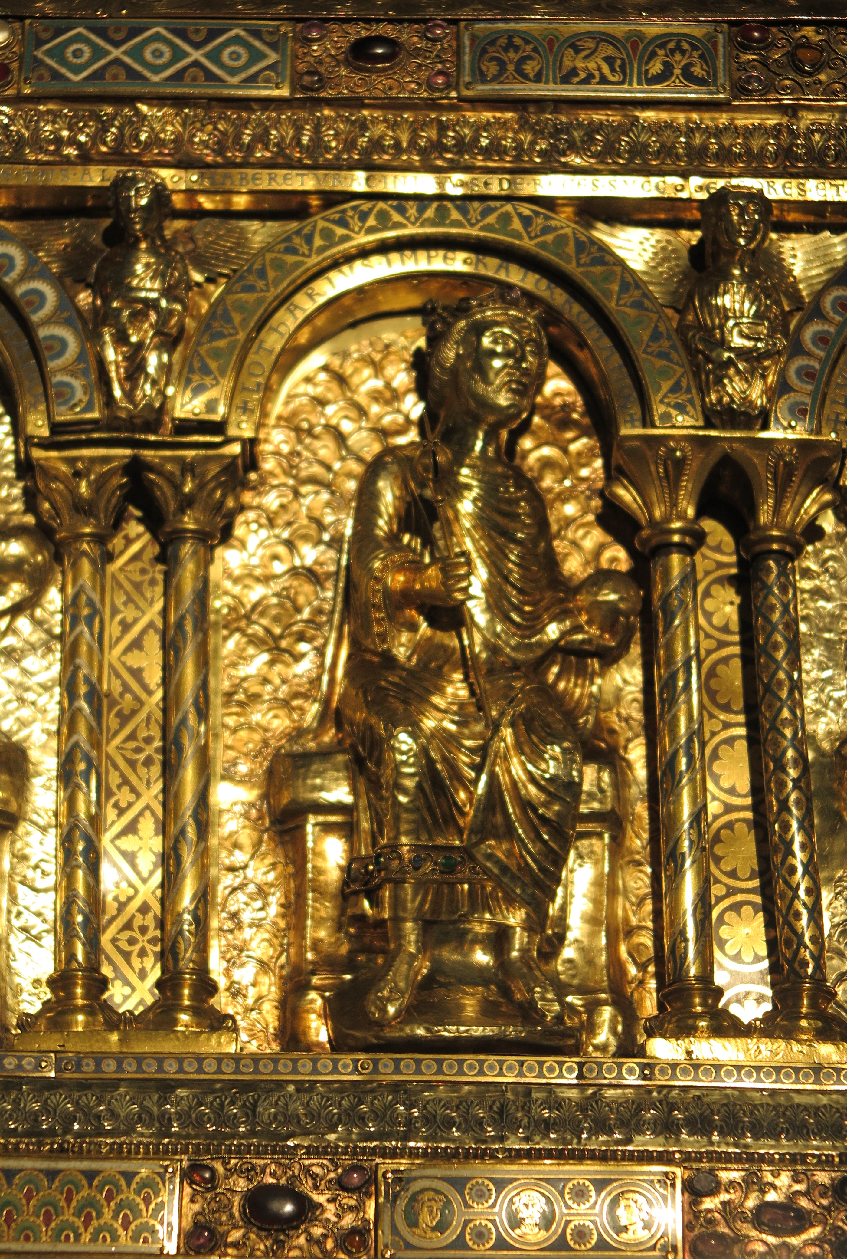 Lothar I. auf der linken Seite des Karlsschreins im Aachener Dom.